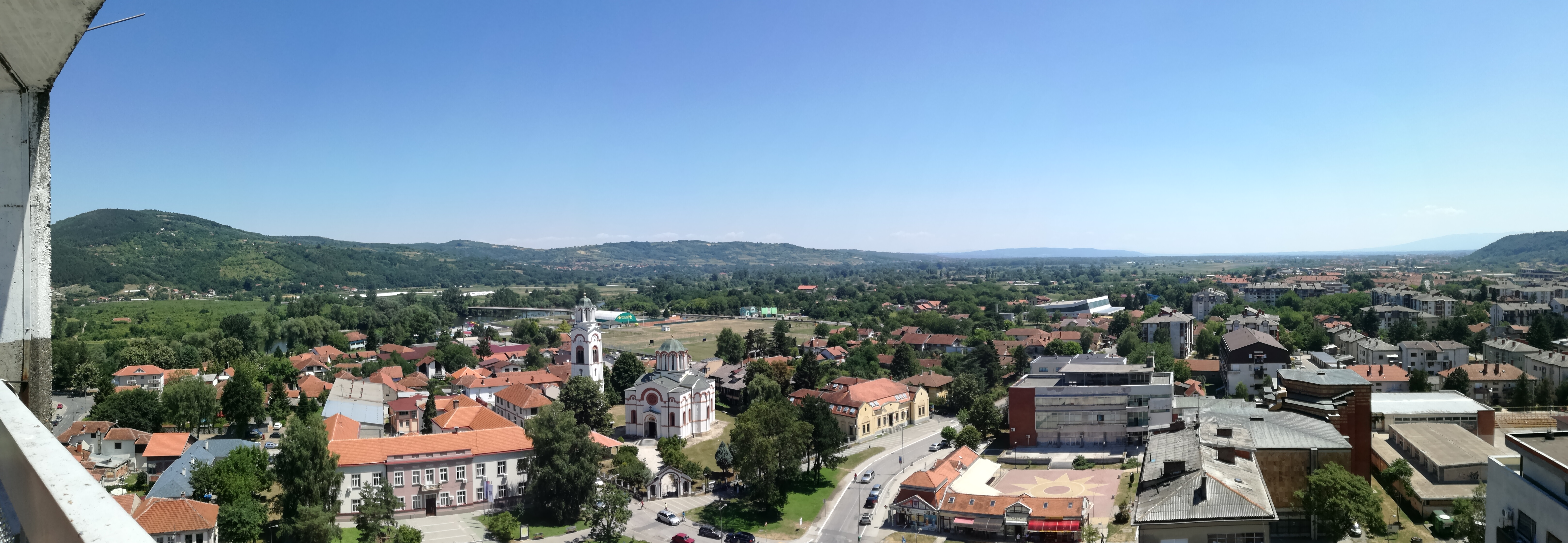 Panorama photo of the city center of Trstenik.